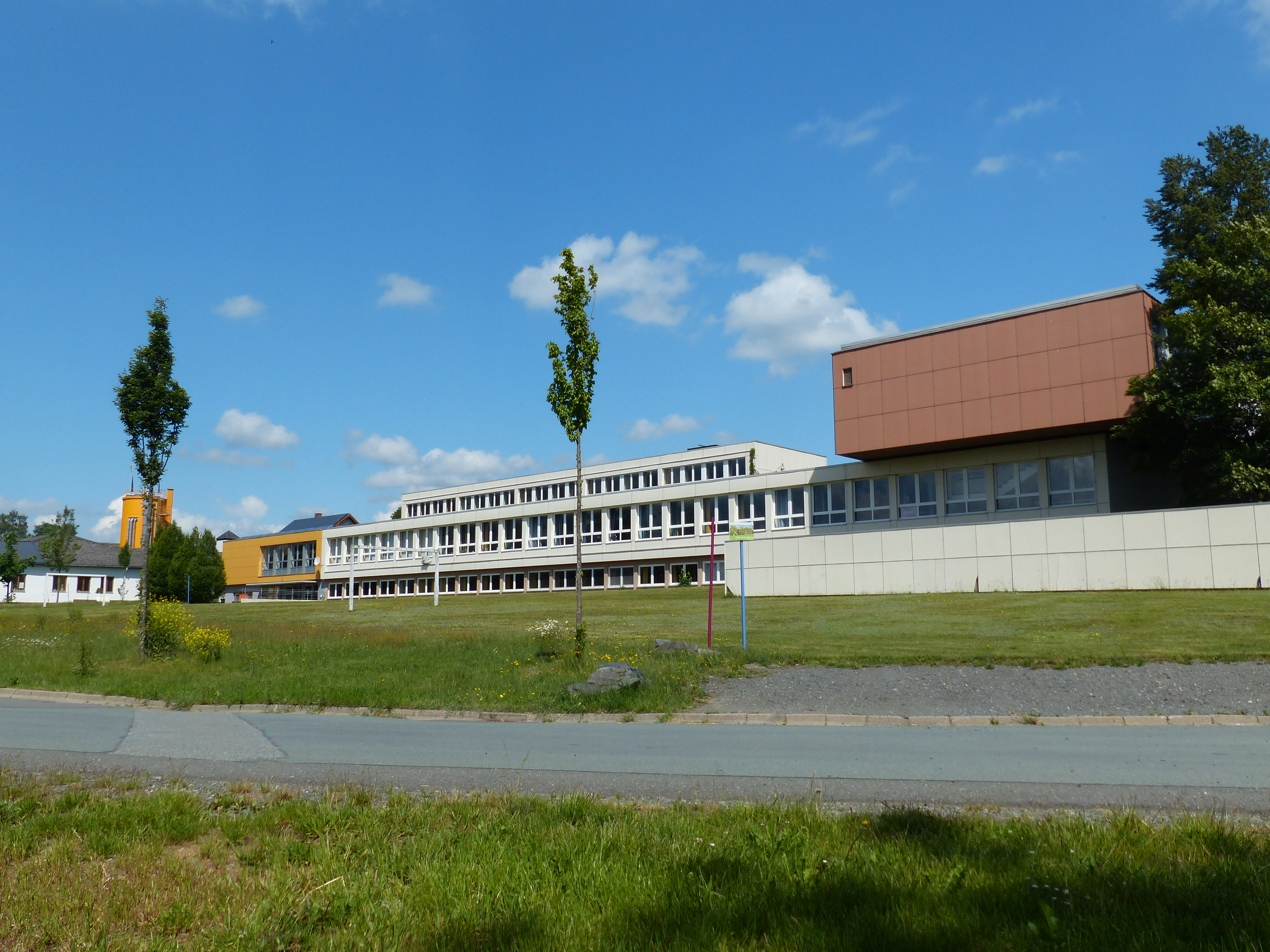 Ortsansichten vom Ortsteil Poppenreuth